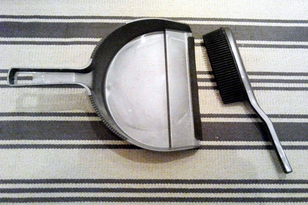 Kehrset aus Kunststoff: Gummihandfeger und Aufnehmer